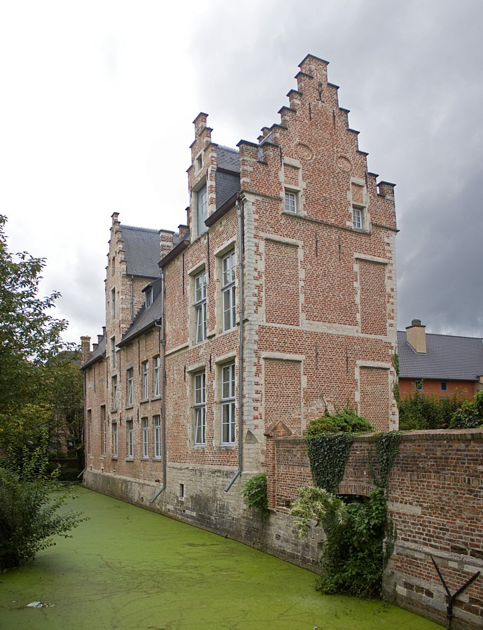 Refugium van de abdij van Tongerlo in Diest